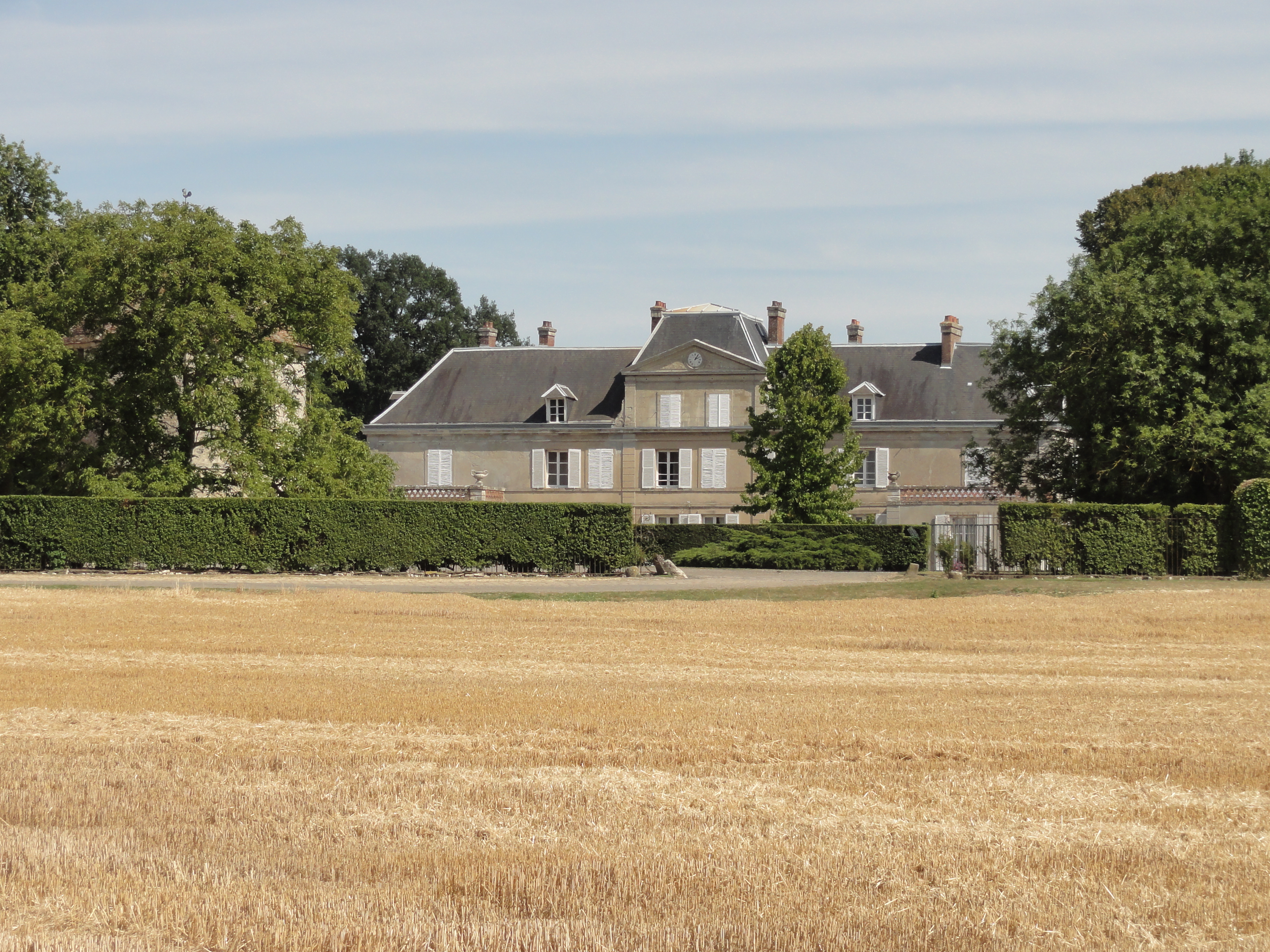 Ferme du Plessis-Veneur, formant un hameau au sud du village.